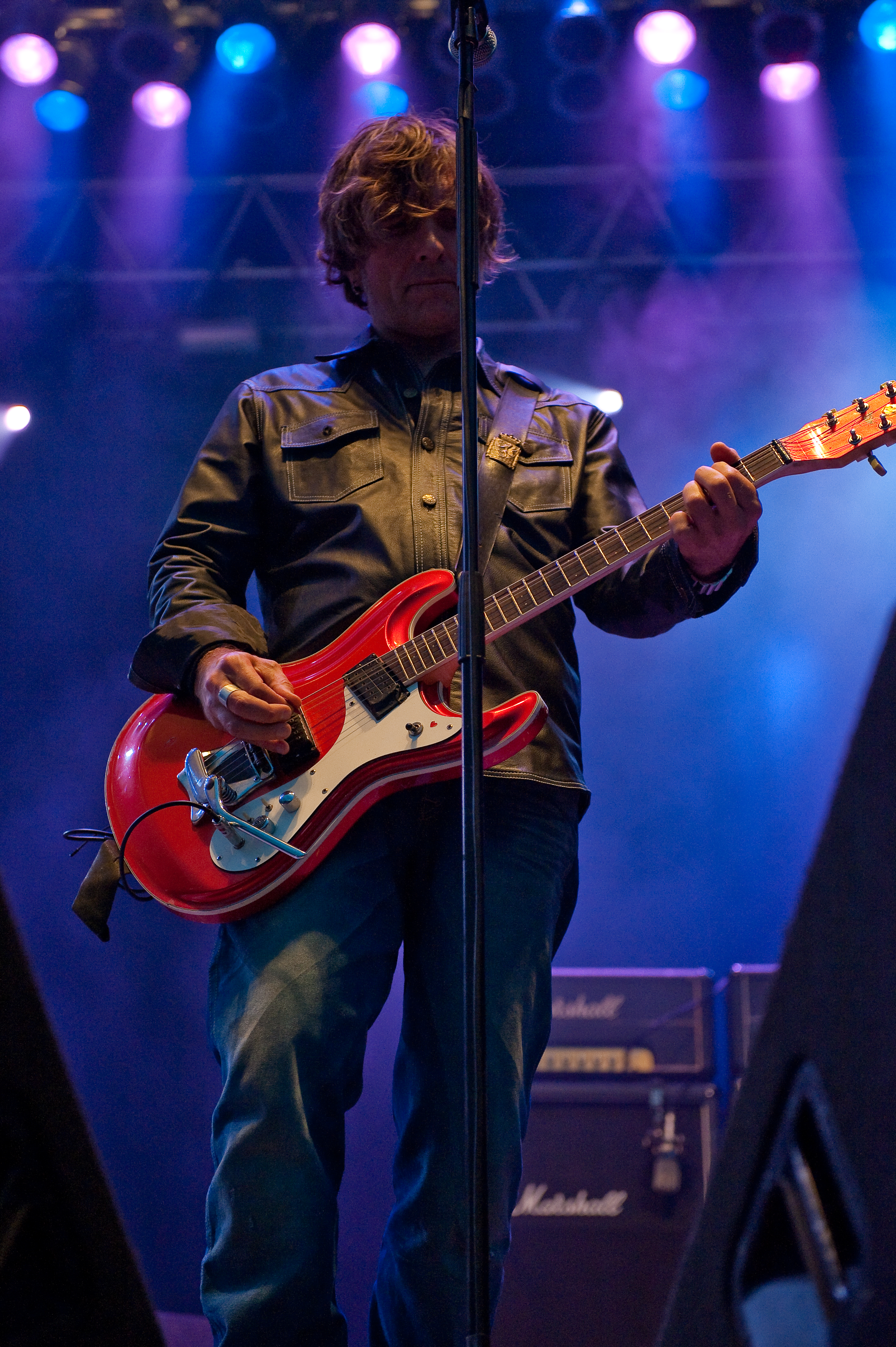 DumDum Boys